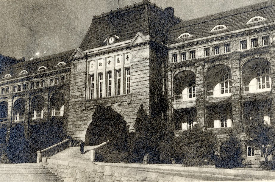 青岛老市政府旧影